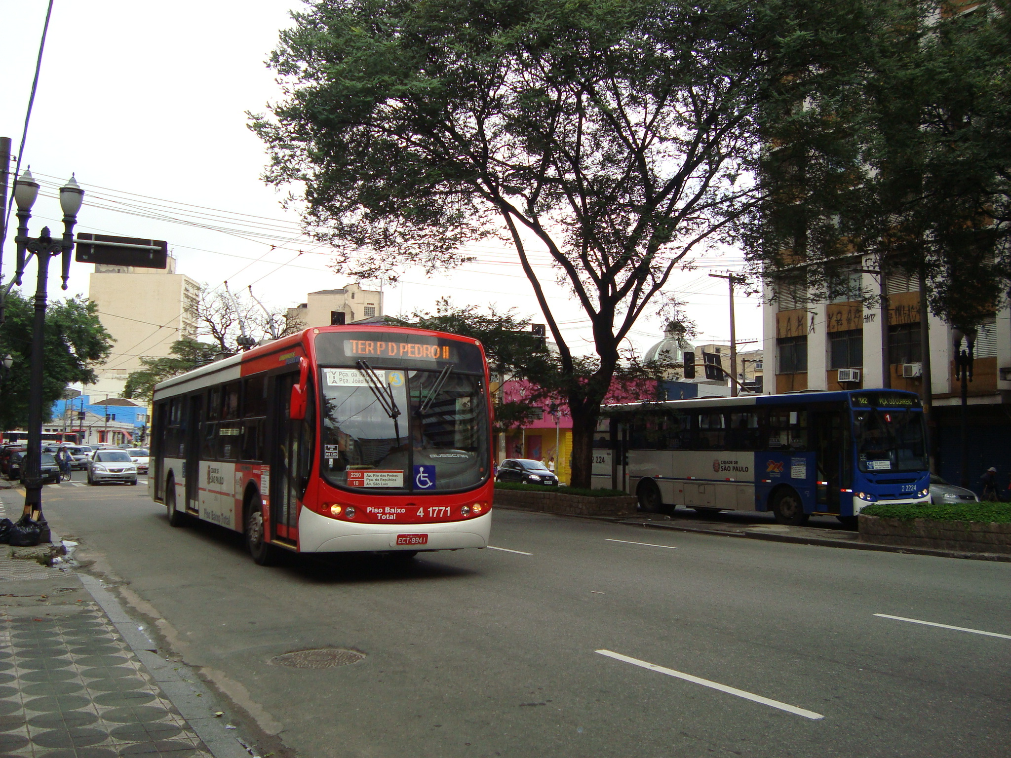 Trólebus de São Paulo na av. Senador Queiroz